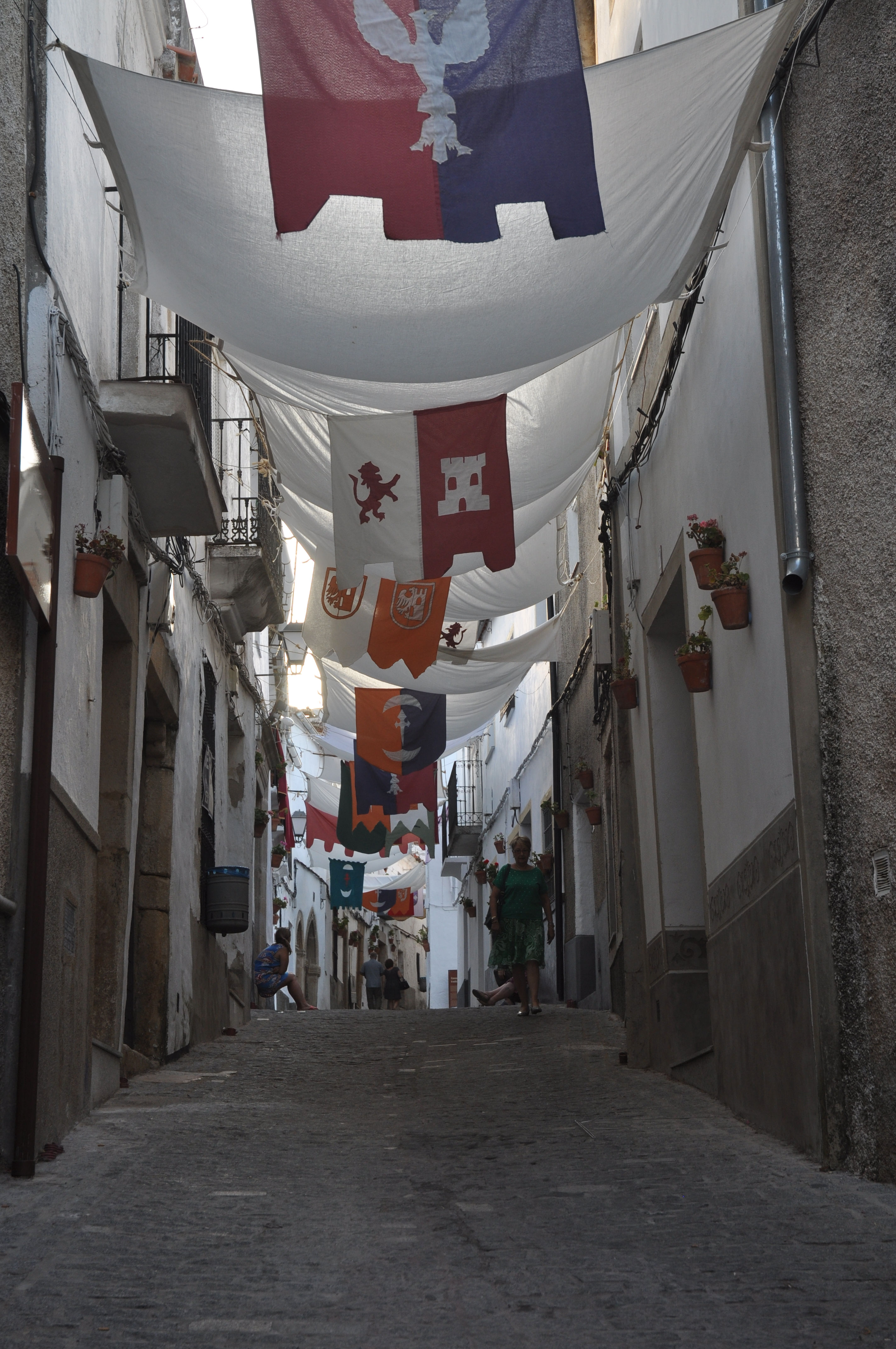 Fiesta Medieval Festival Medieval de Alburquerque This is a photography of a Folklore festival in Spain (Wikidata id Q23662027).